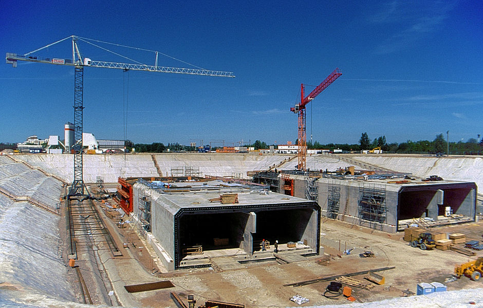 Warnowtunnel Rostock, Fertigung der Tunnelelemente im Trockendock